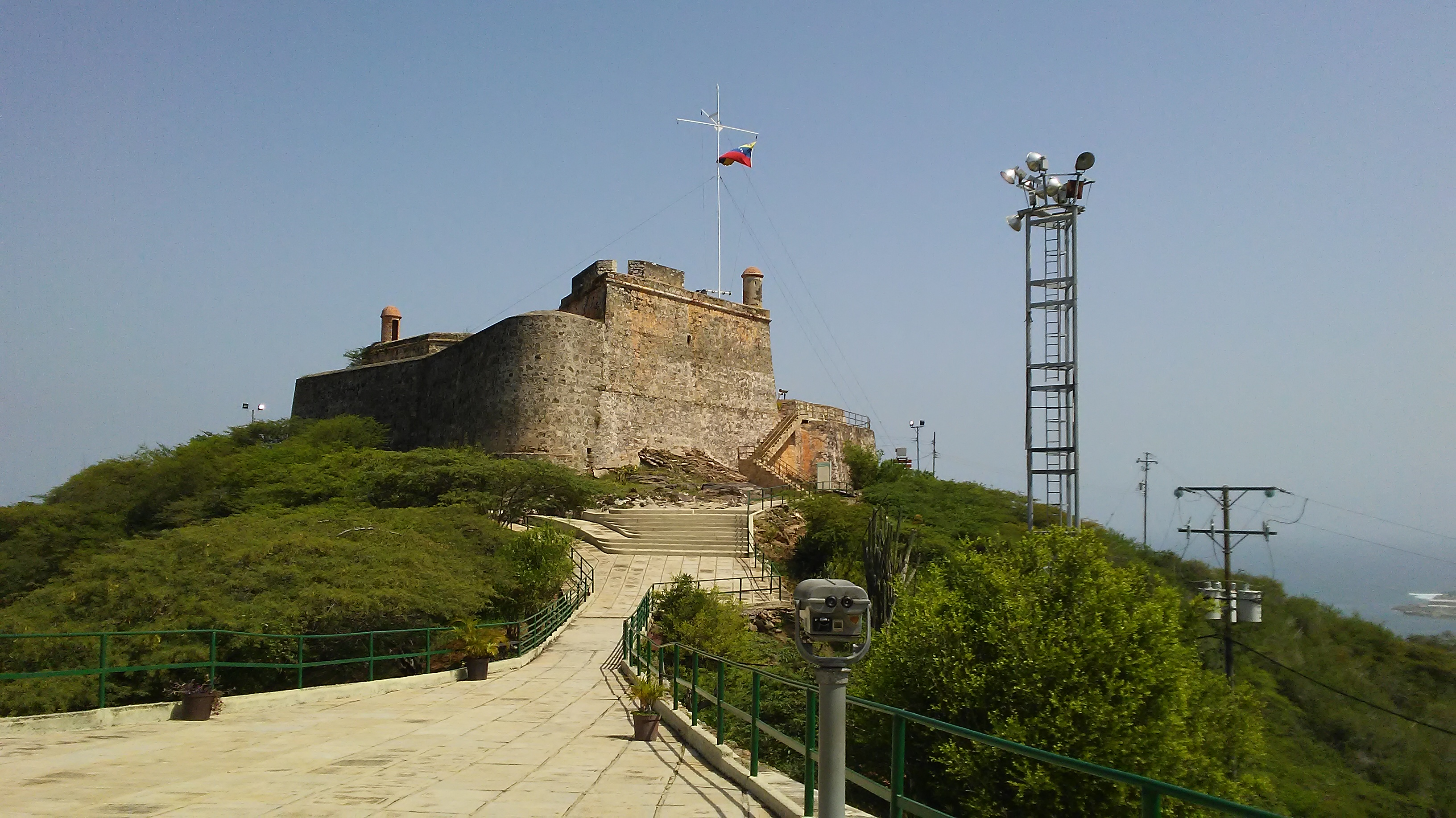 Fortín Solano